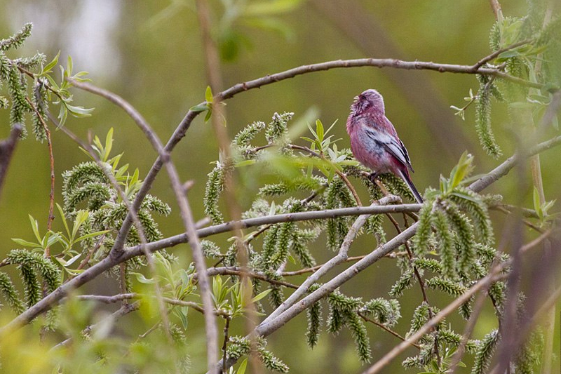 Урагус самец